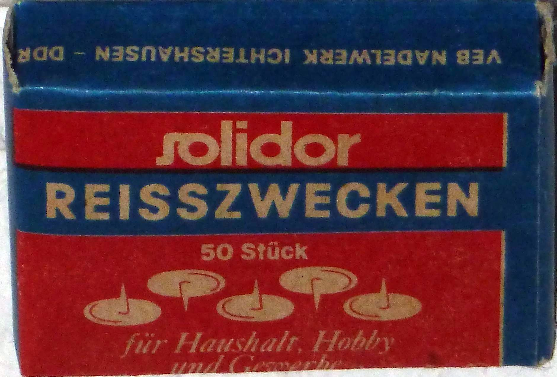 Reisszwecken aus dem Kombinat VEB Nadelwerk Ichtershausen - DDR. Label:Solidor - Reisszwecken für Haushalt, Hobby und Gewerbe